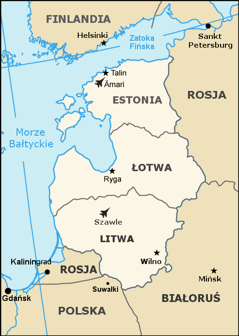 Operacja NATO nadzoru przestrzeni powietrznej Estonii, Litwy, Łotwy.